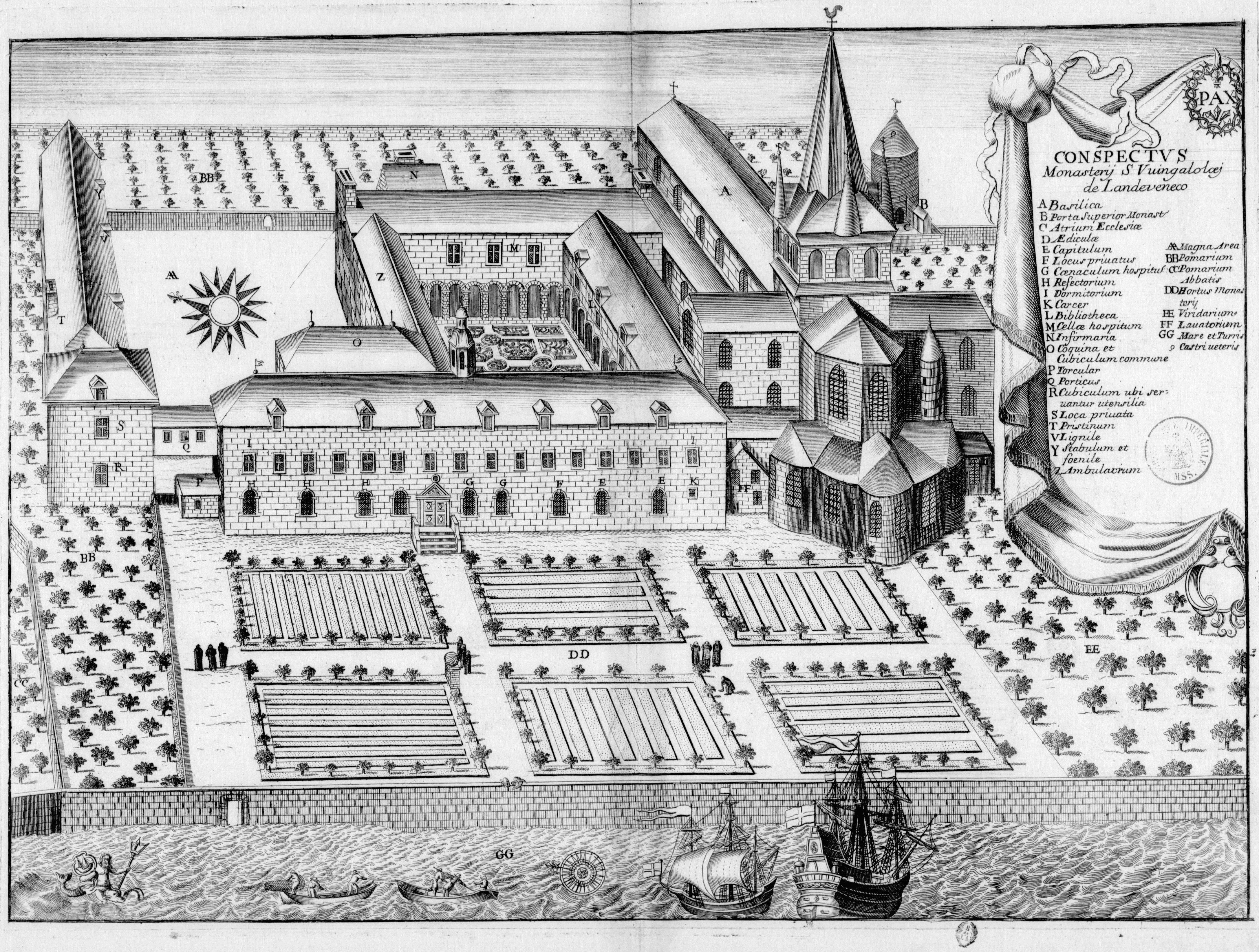 Planche gravée du 17ème siècle représentant l'abbaye Saint-Guénolé de Landévennec, en France, dans le livre Monasticon Gallicanum.